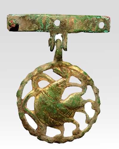 Anhänger mit Greifdarstellung von der Wüstung auf dem Lindenbrink bei Riehe